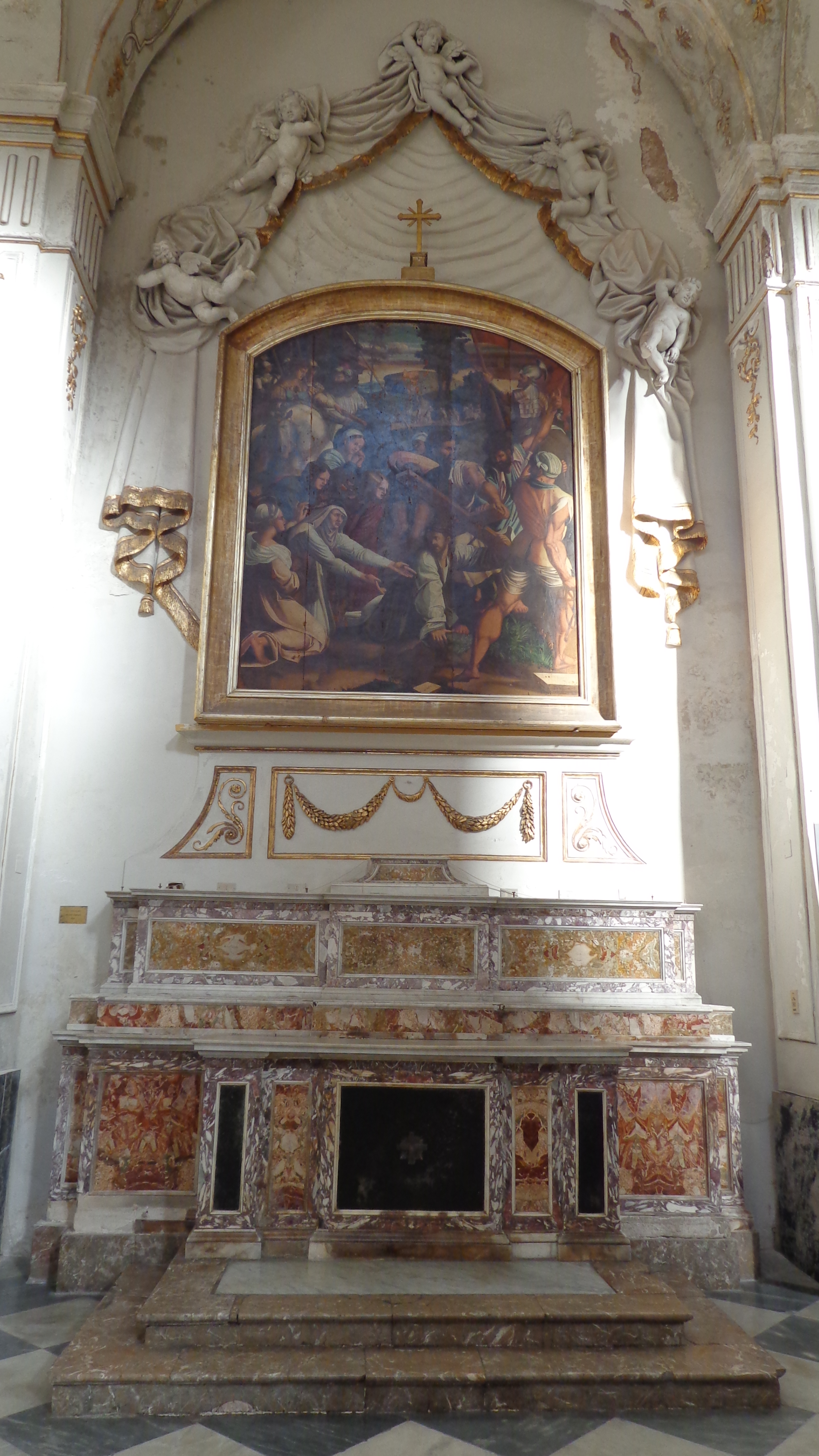 Altare